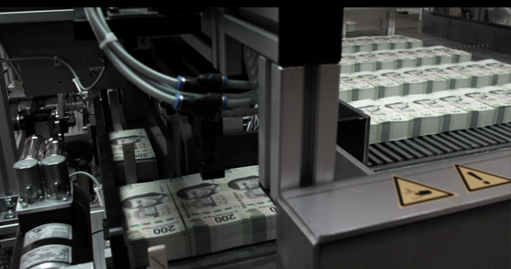 Fabricación de billete alimentación